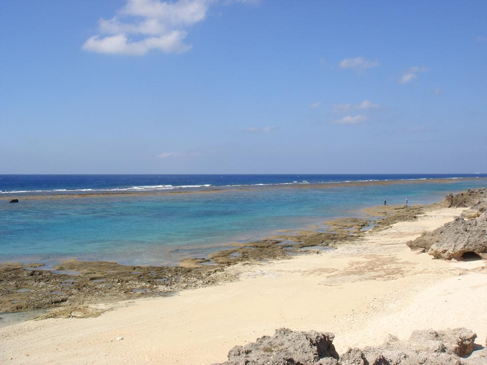 Yakomo beach, Okinoerabu Island, Japan.